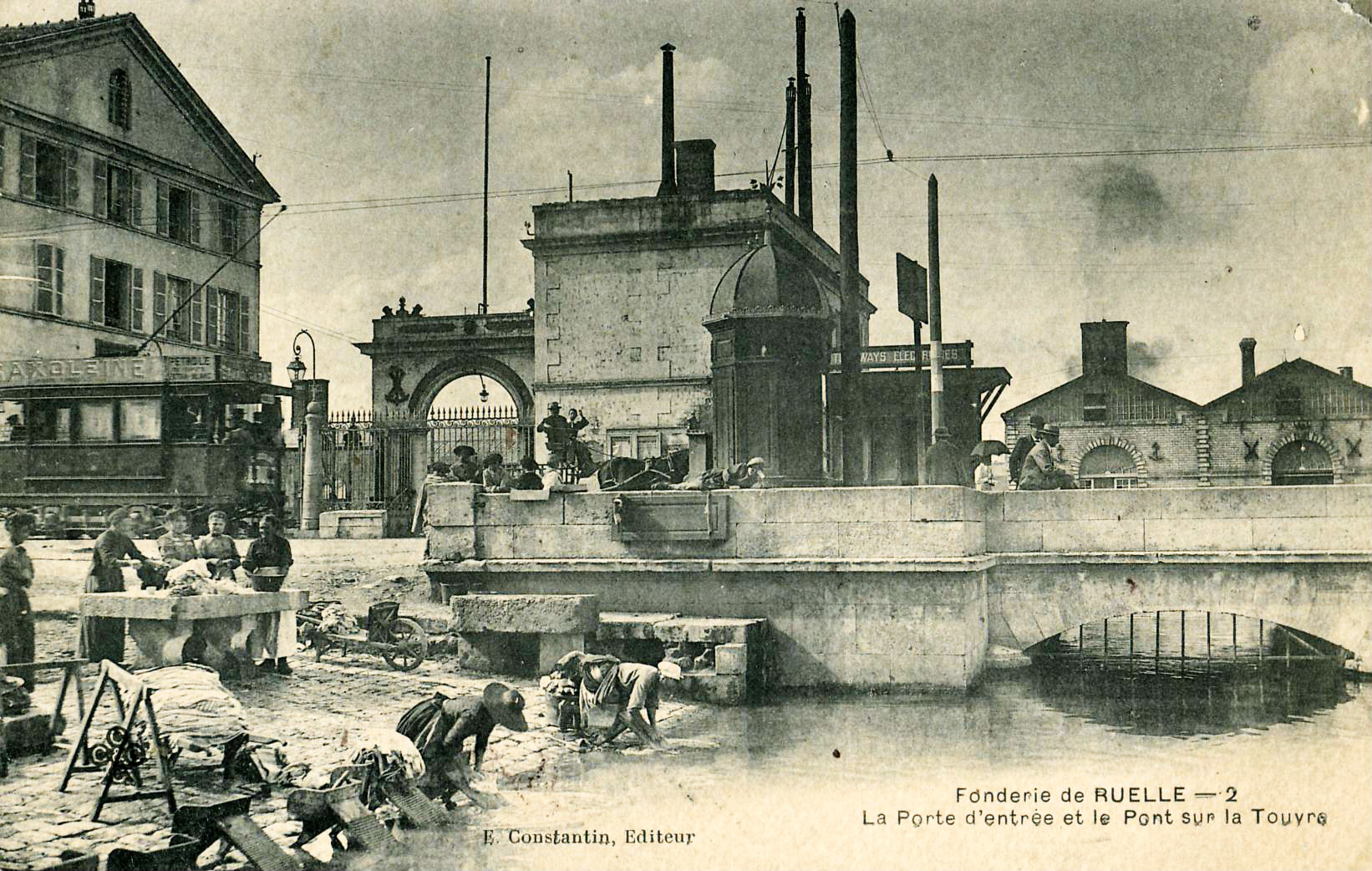 Carte postale ancienne éditée par E. Constantin, n°3 : FONDERIE DE RUELLE - La Porte d'entrée et le Pont sur la Touvre